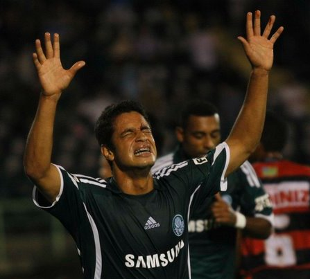 Comemoração gol do zagueiro Léo no Palmeiras em 2010